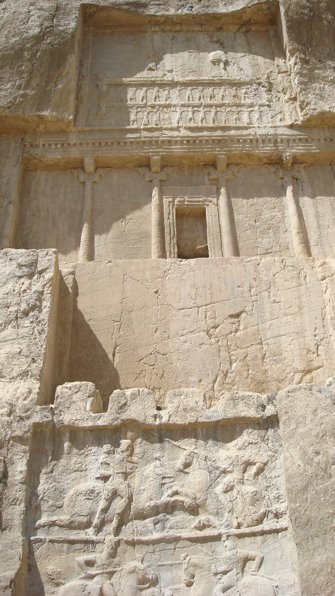 نقش رستم